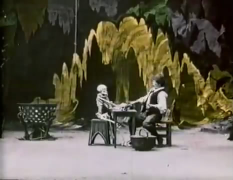 Photo du film "L'antre de la sorcière" (1906, De Chomon)